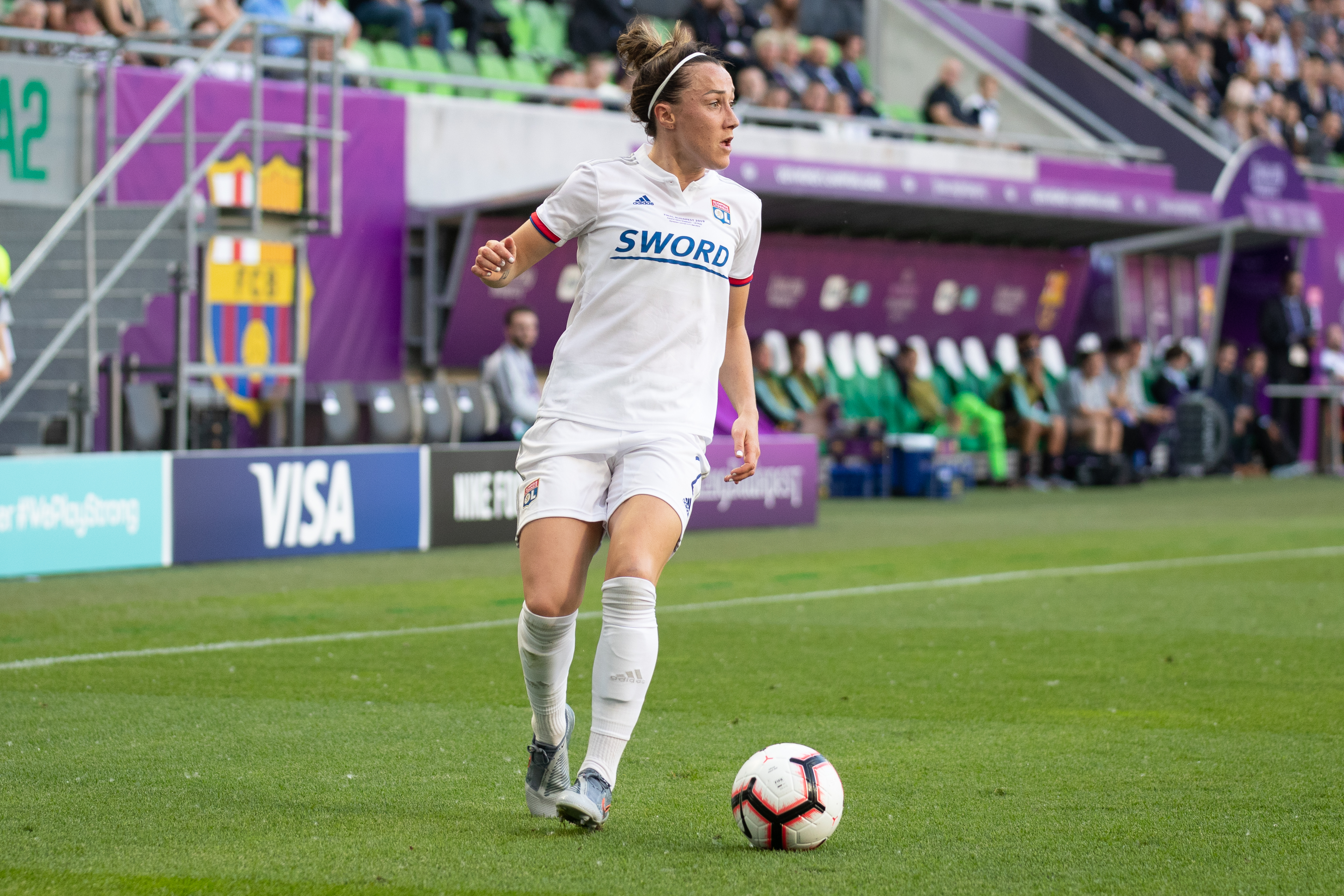 Fußball, Frauen, UEFA Women's Champions League, Olympique Lyonnais - FC Barcelona; Lucy Bronze (Olympique Lyon, 2); Freisteller, Einzelbild, Aktion, action